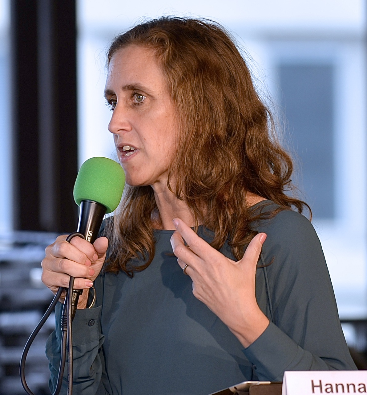 Hanna Stjärne på ett seminarie om vetenskapsjournalistikens möjligheter och utmaningar med anledning av Vetandets värld/P1 40 årsjubileum. Plats: Kulturhuset i Stockholm den 9 september 2014.